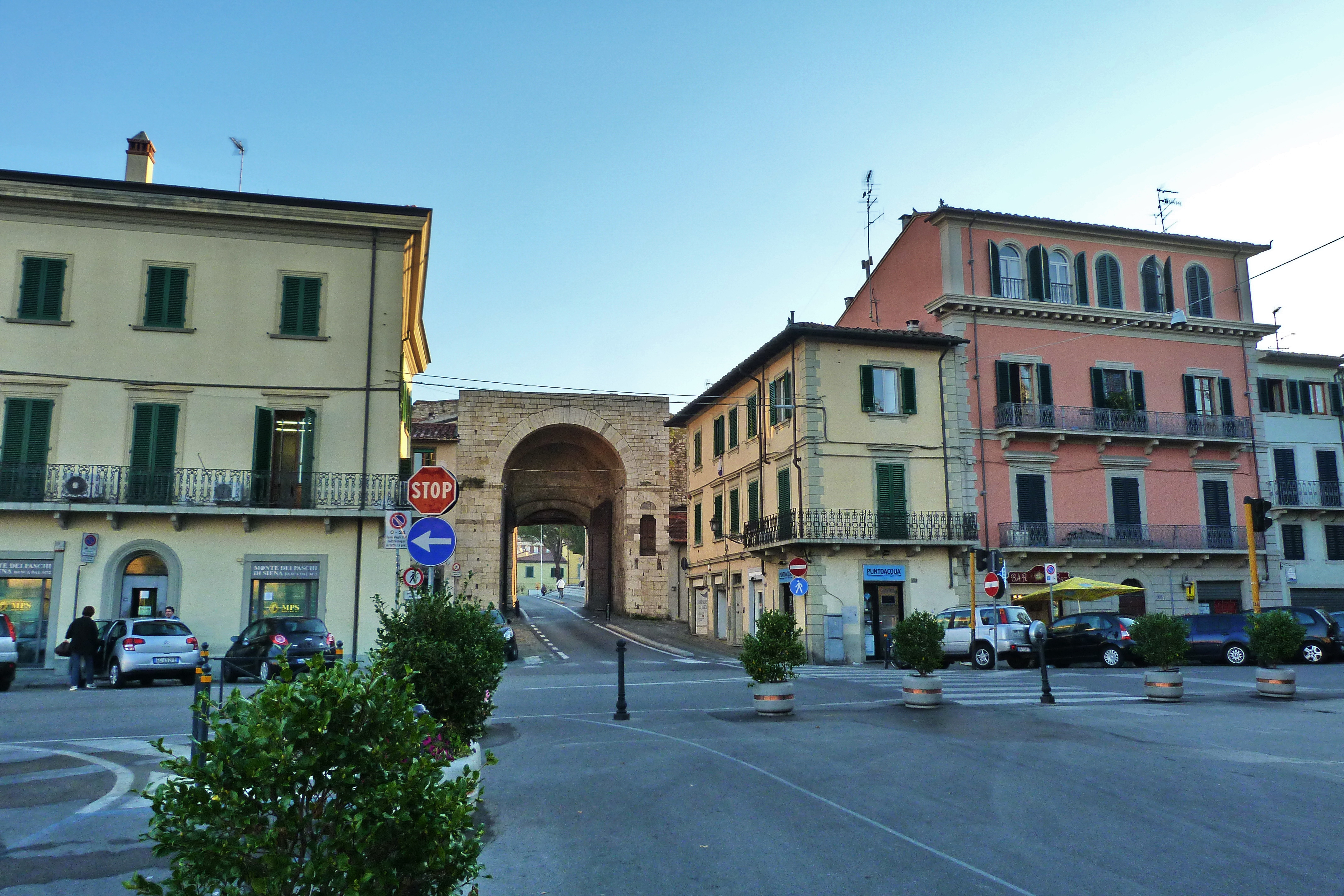 Piazza Mercatale lato Porta Mercatale, Prato, Toscana, Italia This is a photo of a monument which is part of cultural heritage of Italy.